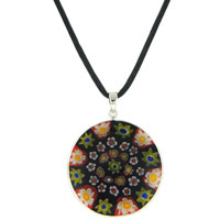 Millefiori Pendant